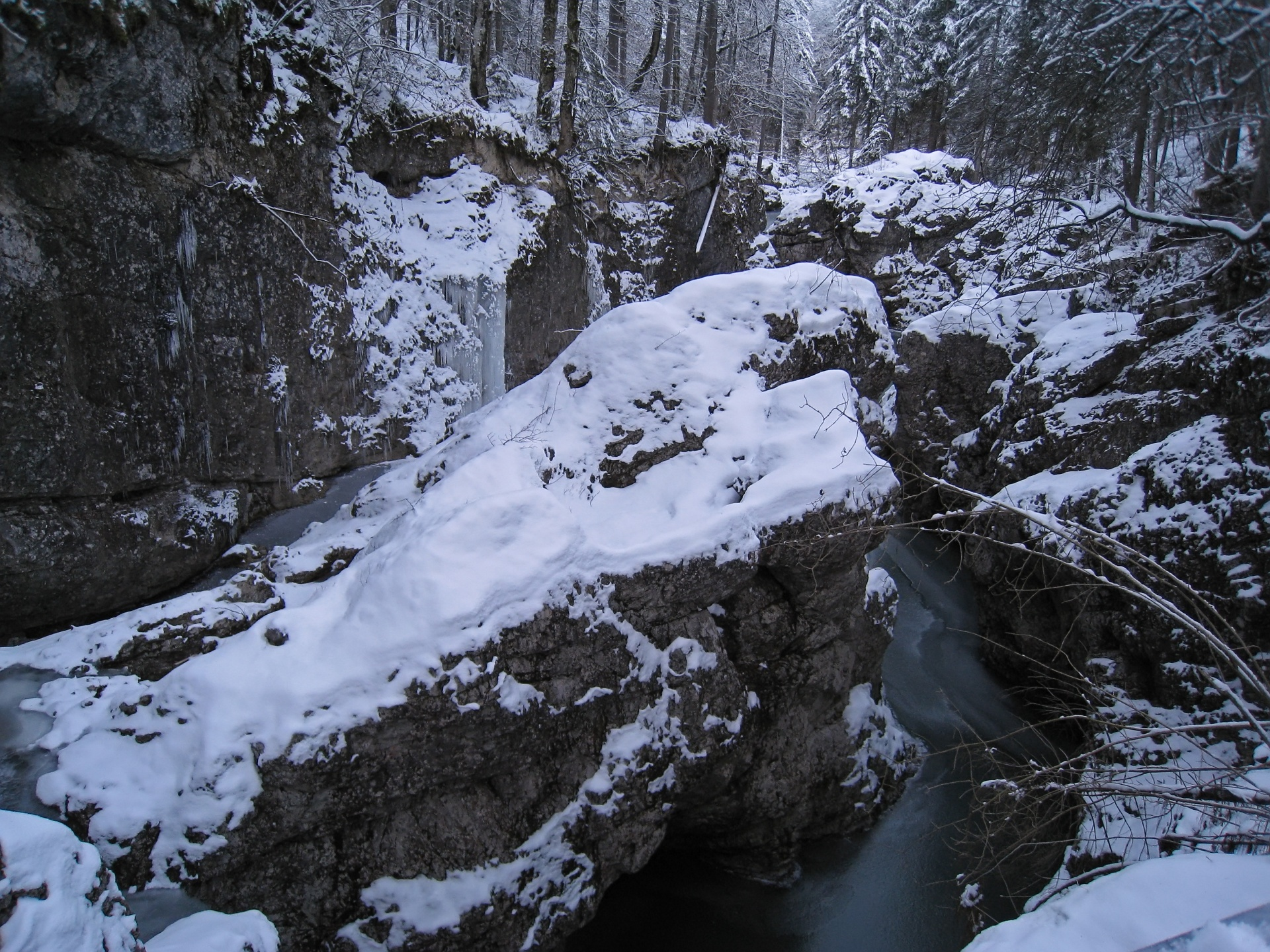 Walchenklamm